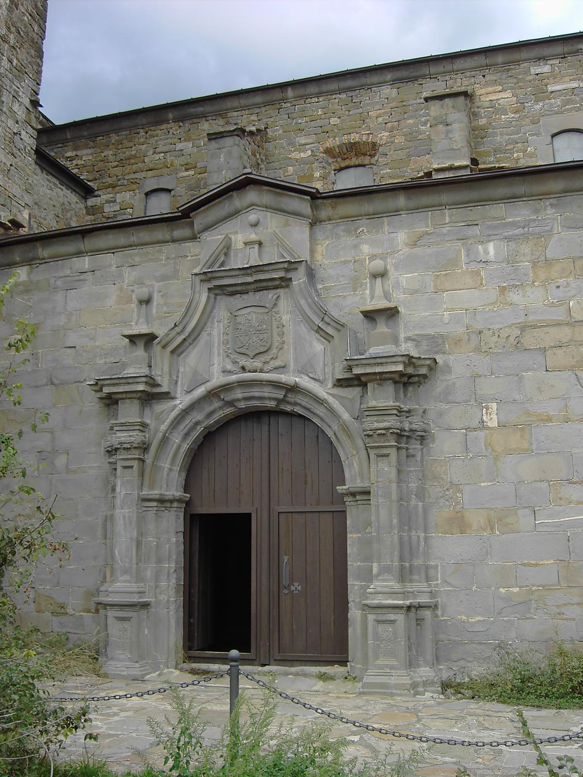 El pórtico (portalada) del monasterio de San Victorián.